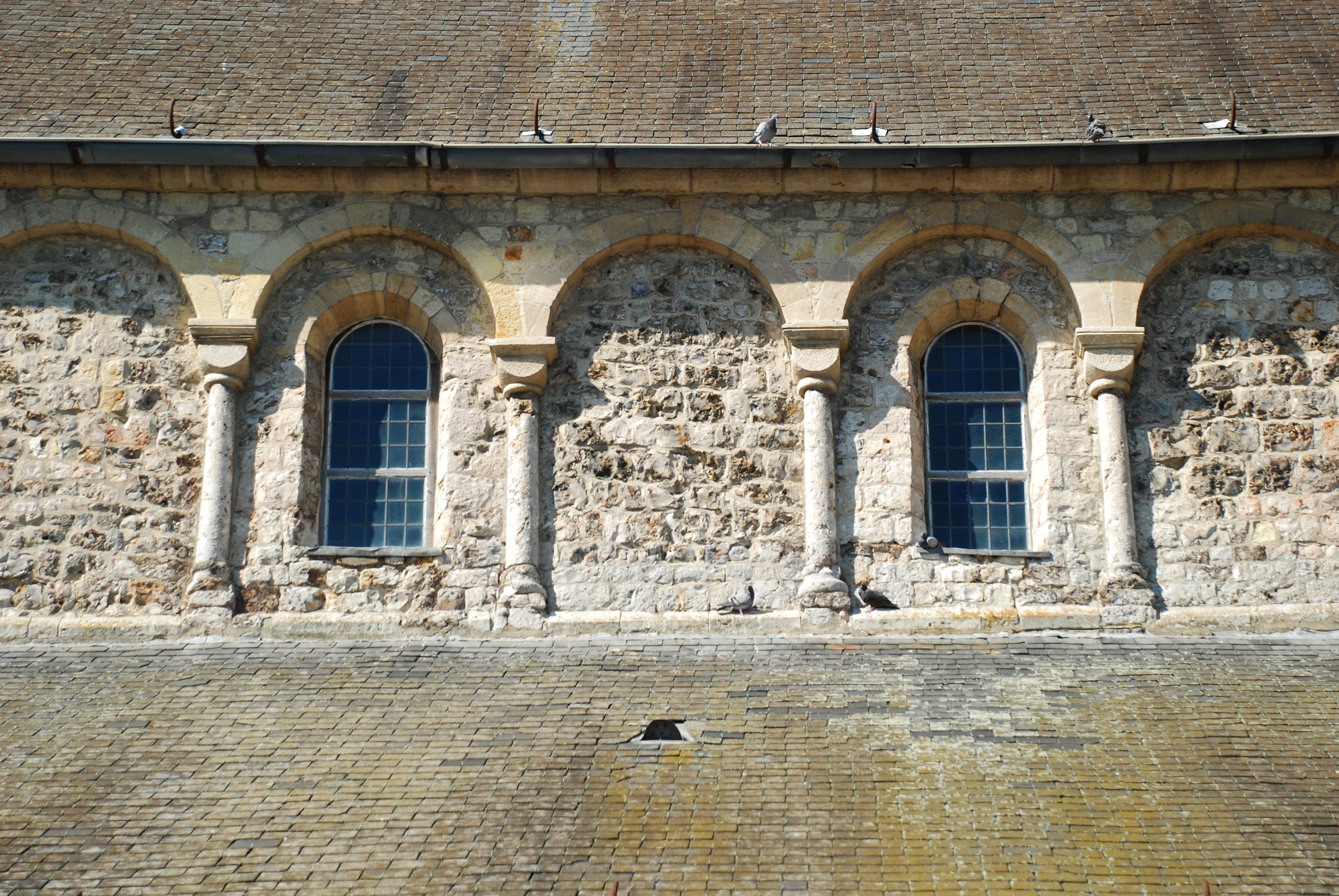 Belgique - Brabant wallon - Église Sainte-Adèle-et-Saint-Martin d'Orp-le-Grand